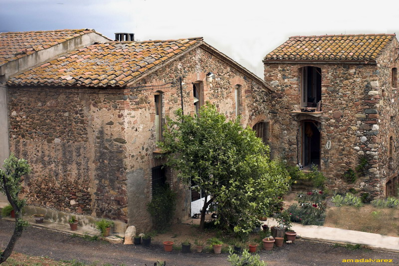 Masia de Mas_Dorca a l'Ametlla del Vallès (Vallès Oriental-Catalunya)